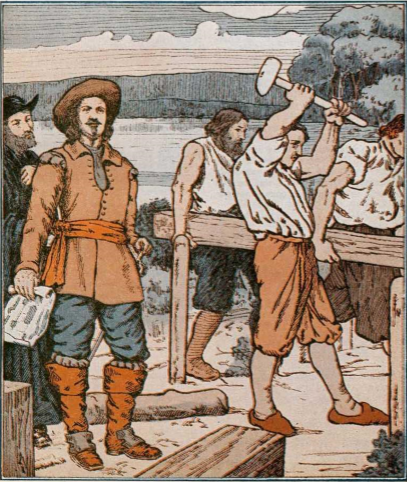 Le Sieur de La Violette fonde les Trois Rivières. Première de couverture de L'Oiseau Bleu, publiée par la Société Saint-Jean Baptiste de Montréal. Volume XIV - No 10. Montréal, mai 1934. BANQ.